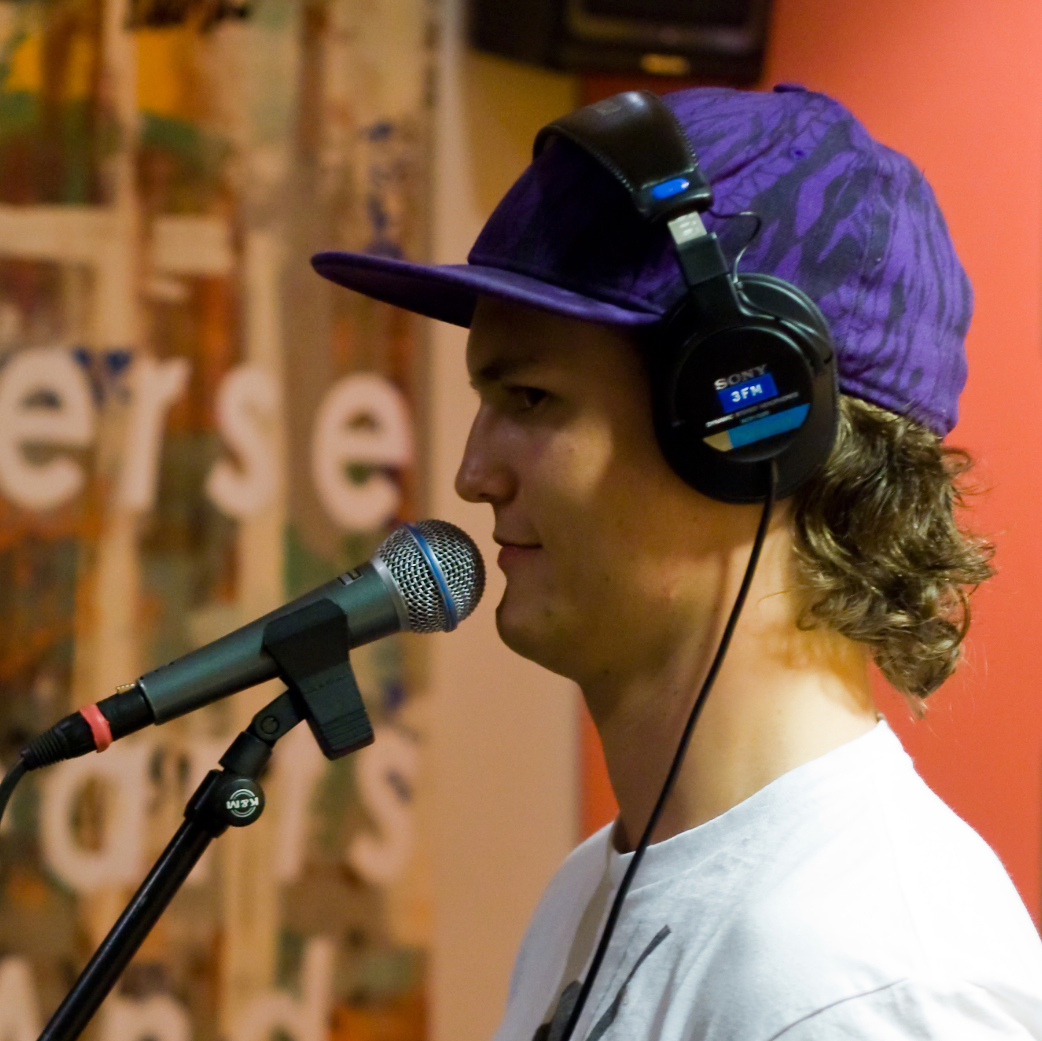 Thomás Goethals, artiestennaam The Flexican, is een Nederlandse/Mexicaanse diskjockey. Hij is lid van de groep Flinke Namen. DJ The Flexican tijdens een optreden van Flinke Namen bij het 3FM-programma MetMichiel.